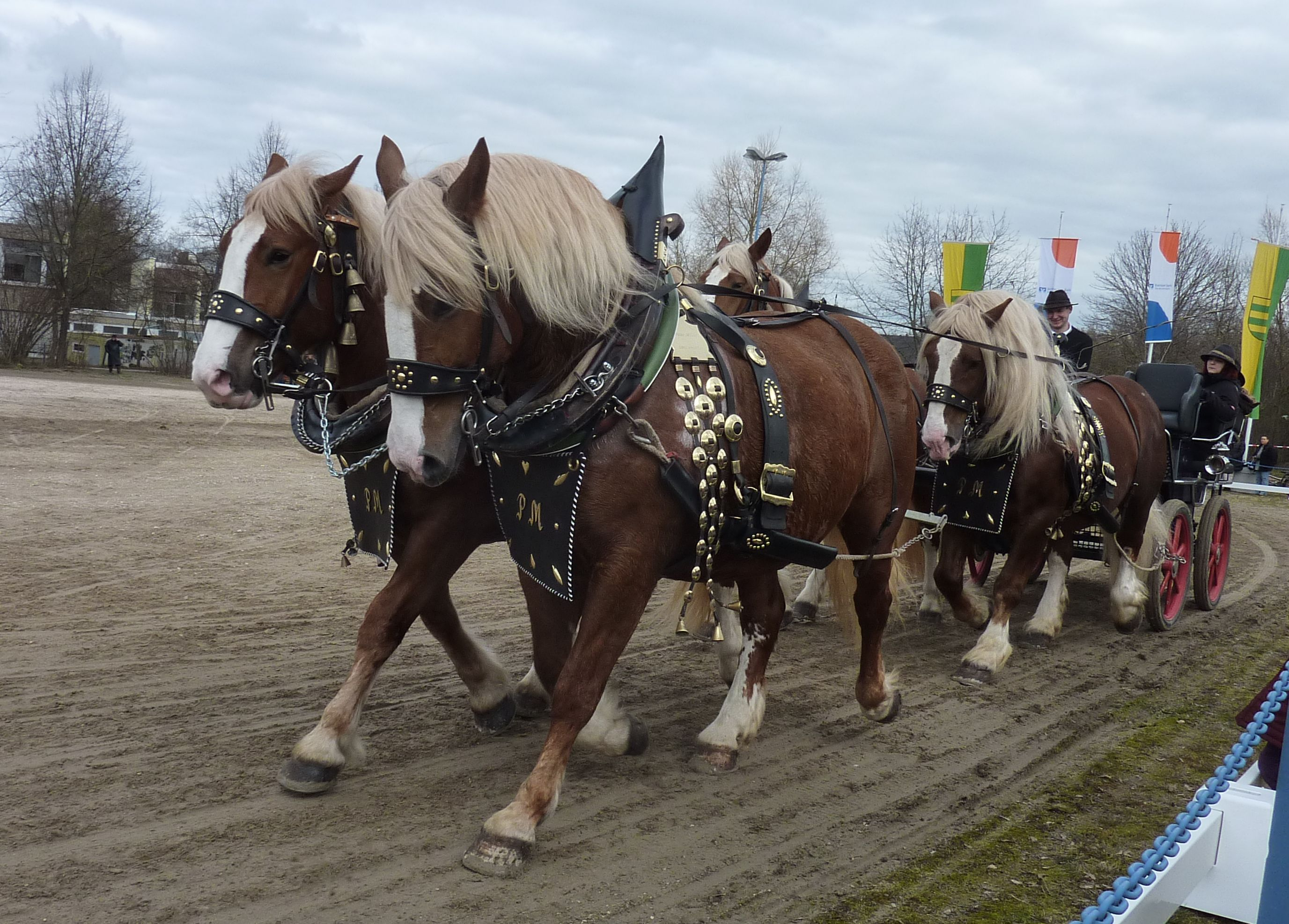 Pferdemarkt Bernhausen 2014